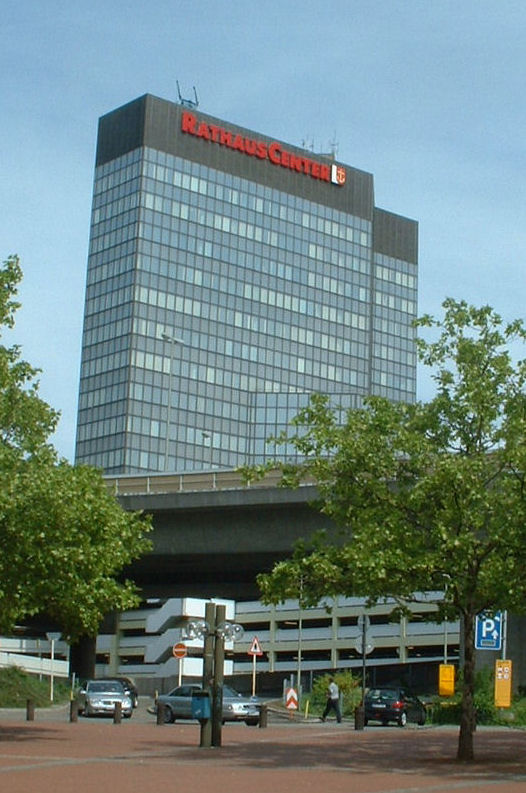 Rathaus-Center, Ludwigshafen am Rhein, Rheinland-Pfalz (Germany)